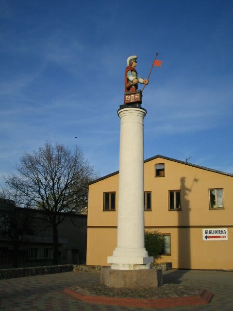 Statuja Svētajam Florianam.